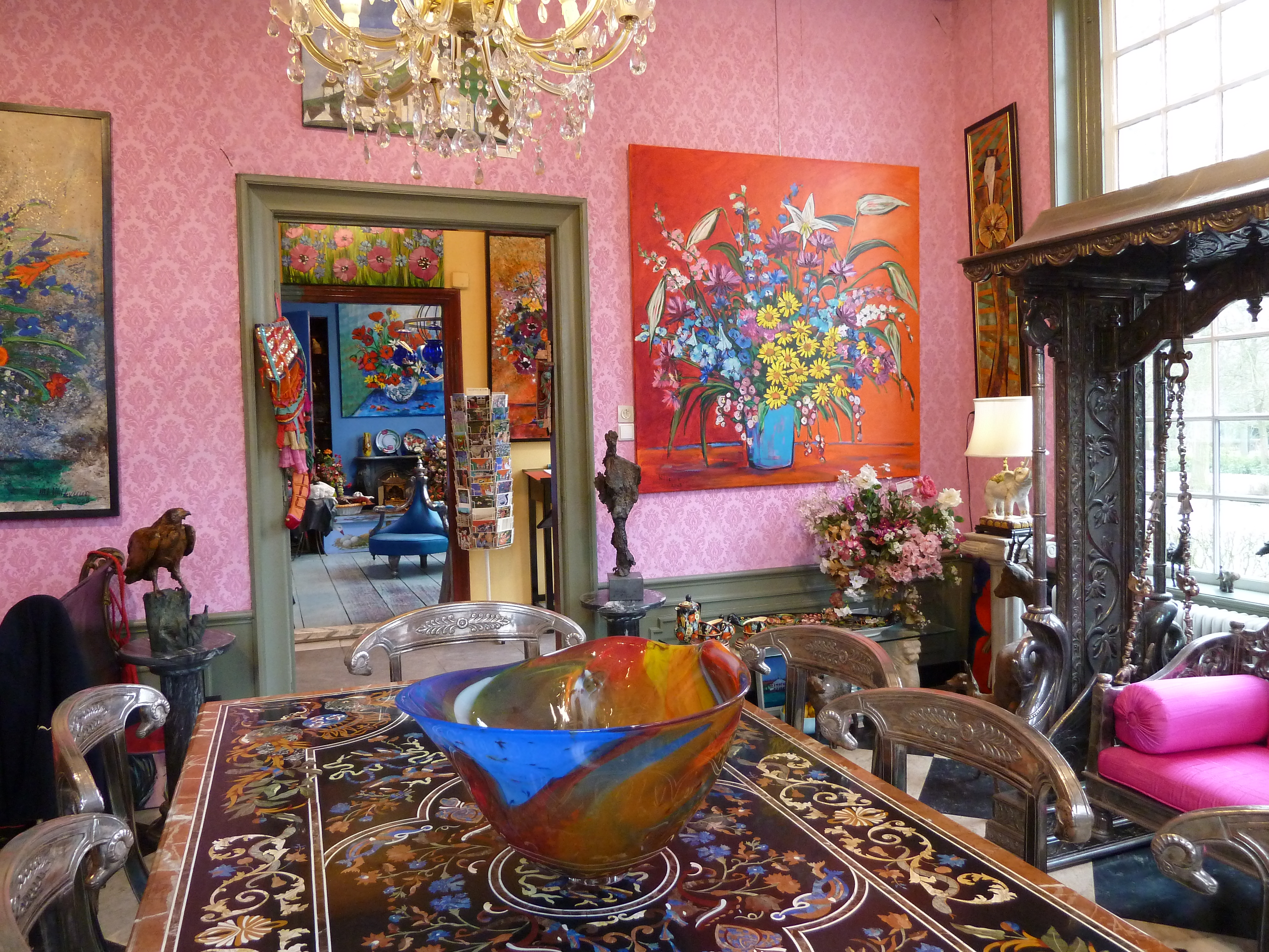 Gallerie van Maya Wildevuur in de Ennemaborg.